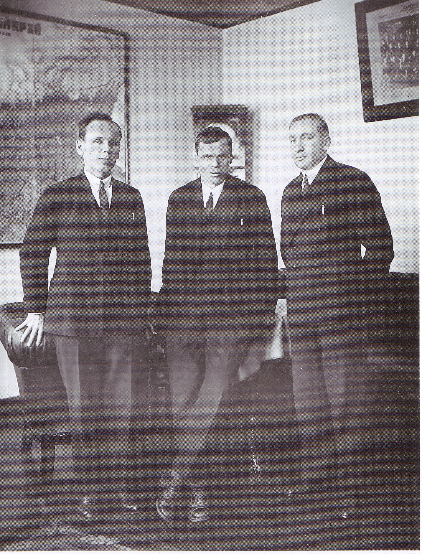 Дмитрий Алексеевич Конторин (слева) и Сергей Адамович Бергавинов (в центре)